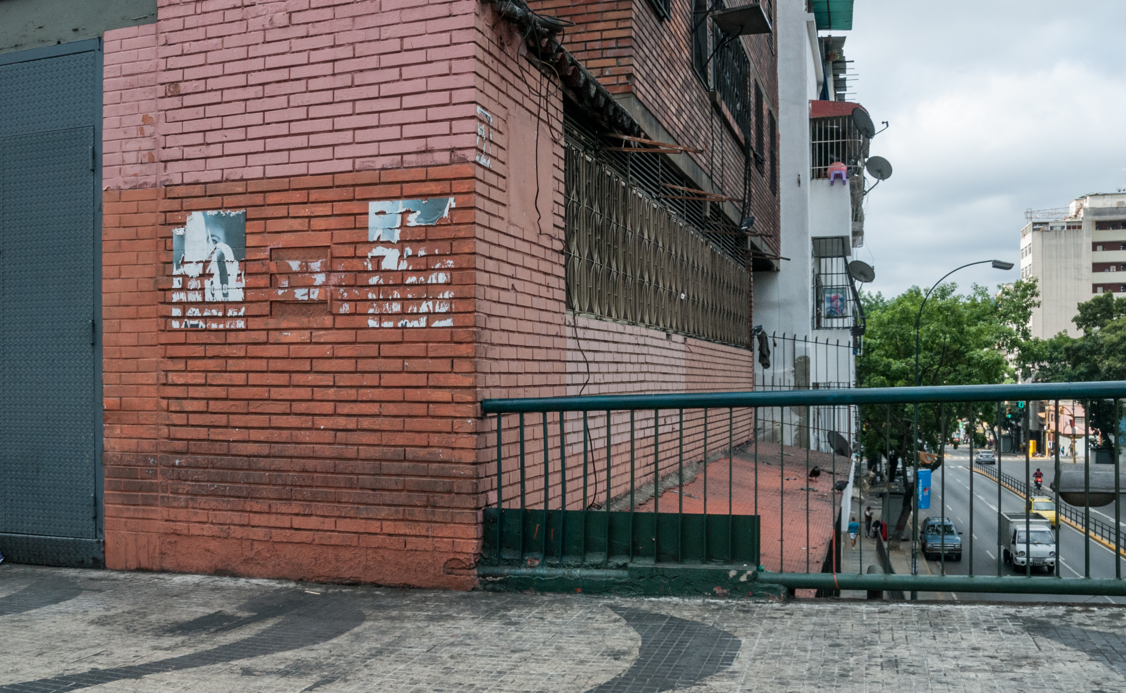 Puente LLaguno. Lugar desde donde se efectuó el tiroteo.